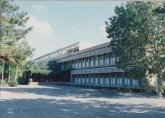 הפקולטה לכימיה בטכניון - חיפה